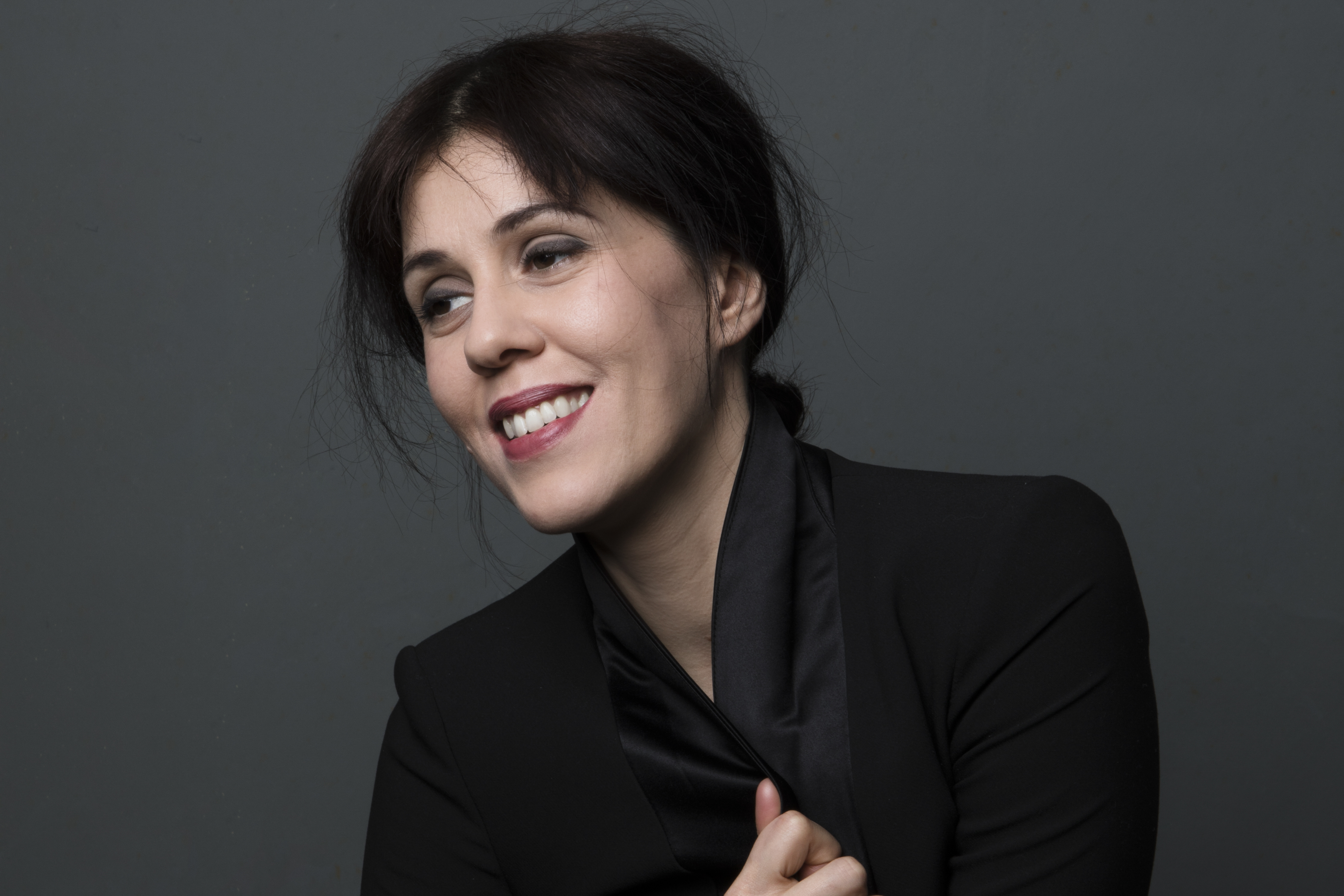 Wien, 2018, von Andrea Peller